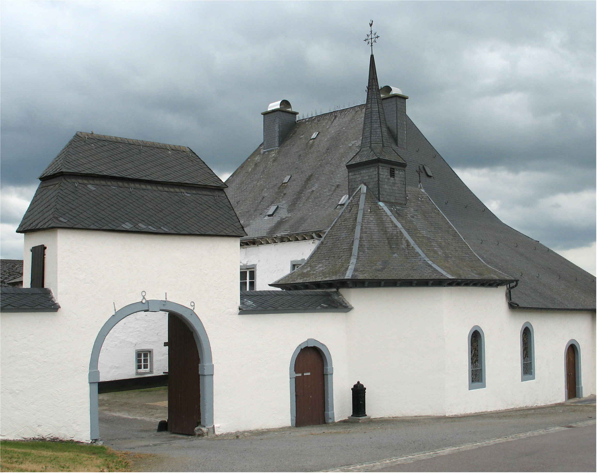 Bauerenhaff mat Kapell zu Weiler. Weiler Kategorie:Gemeng Wëntger